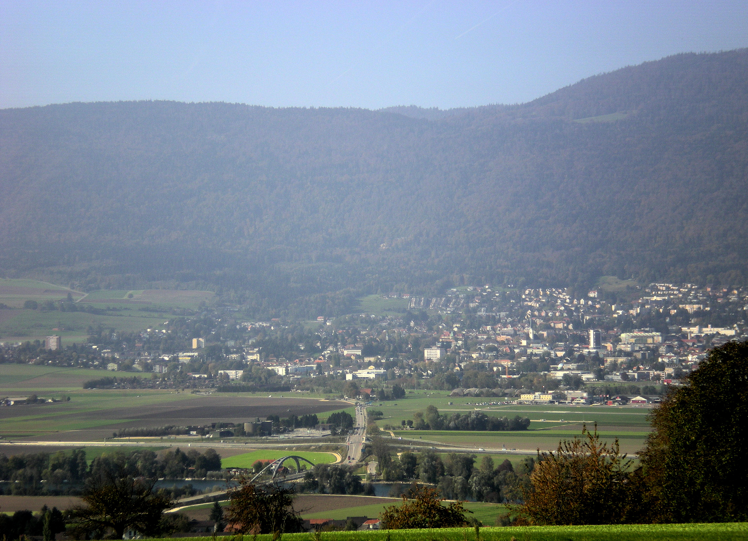 Grenchen Arebrcke von Süden, Arch her